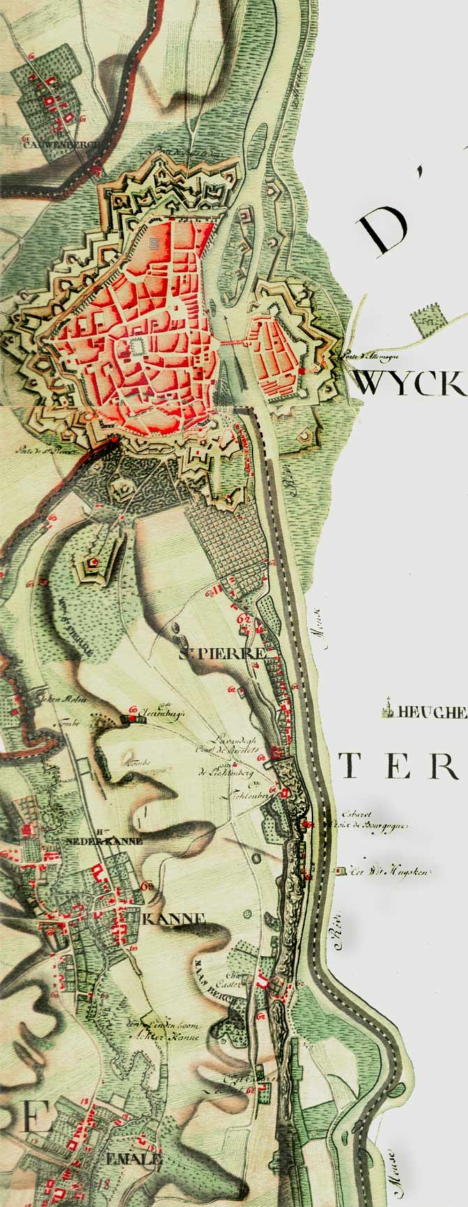 Uittreksel uit de de Ferrariskaart met Maastricht, tonende de mate van detail en de aard der opgenomen gegevens.